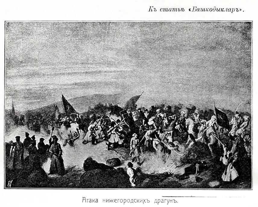 Данное изображение было использовано в статье «Башкадыклар» опубликованной в четвёртом томе «Военной энциклопедии», который был издан книгоиздательским товариществом Ивана Дмитриевича Сытина в 1911 году в столице Российской империи городе Санкт-Петербурге.